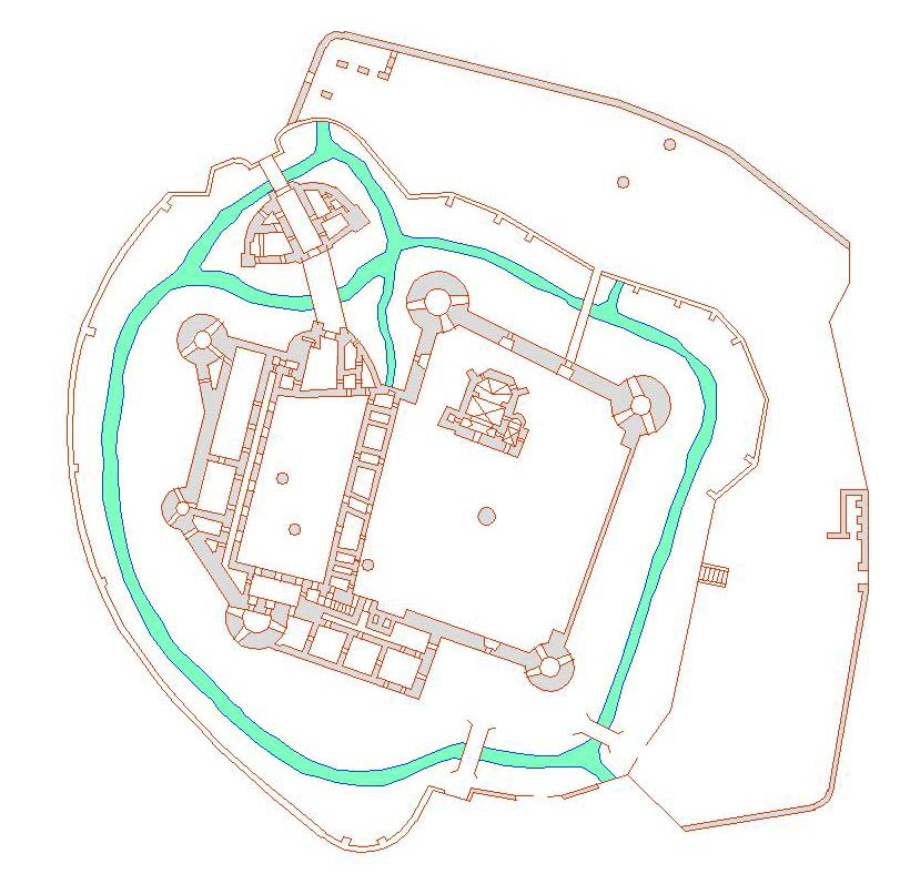 Kobersdorf-Kabold, Austria, Burgenland. Plan of the castle.